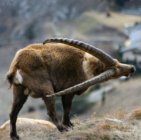 Bouquetin mâle se grattant l'arrière trainn avec ses cornes. Aussois, le 25/03/2006. Auteur : LE METAYER Aurélien. Licence : Creative Commons BY